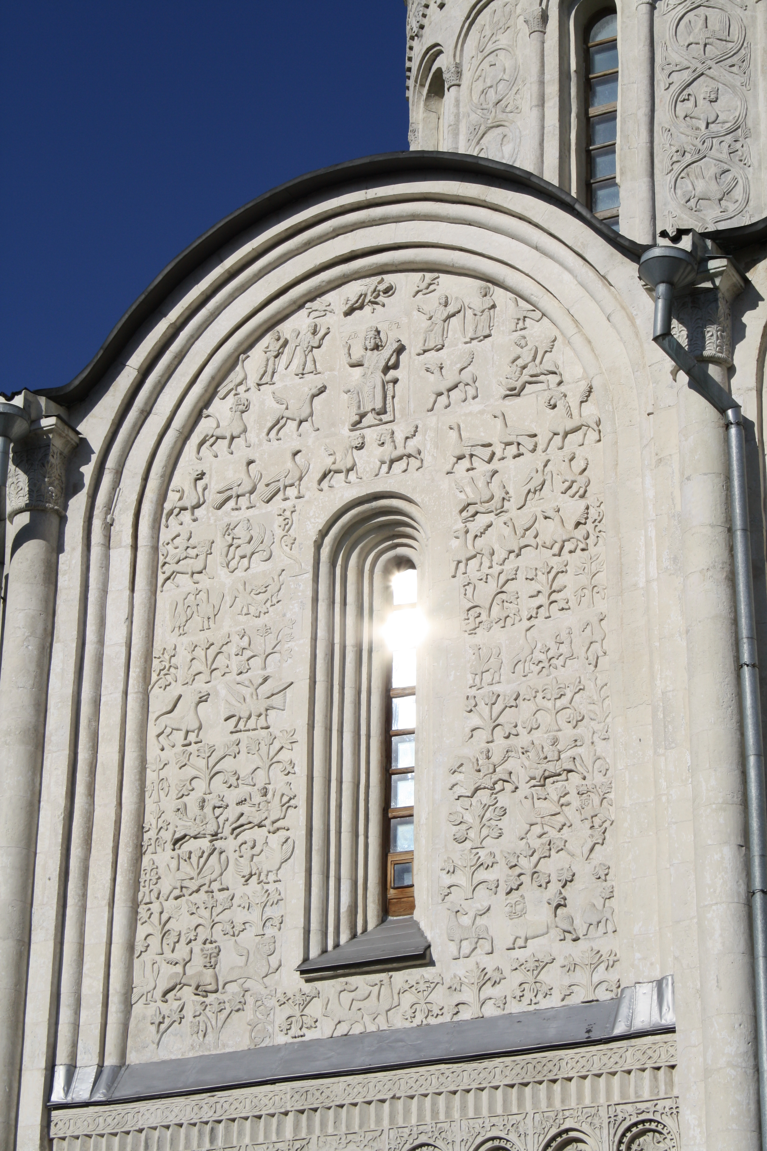 Cathedral of Saint Demetrius. Vladimir. Russia. Дмитриевский Собор. Владимир. Россия